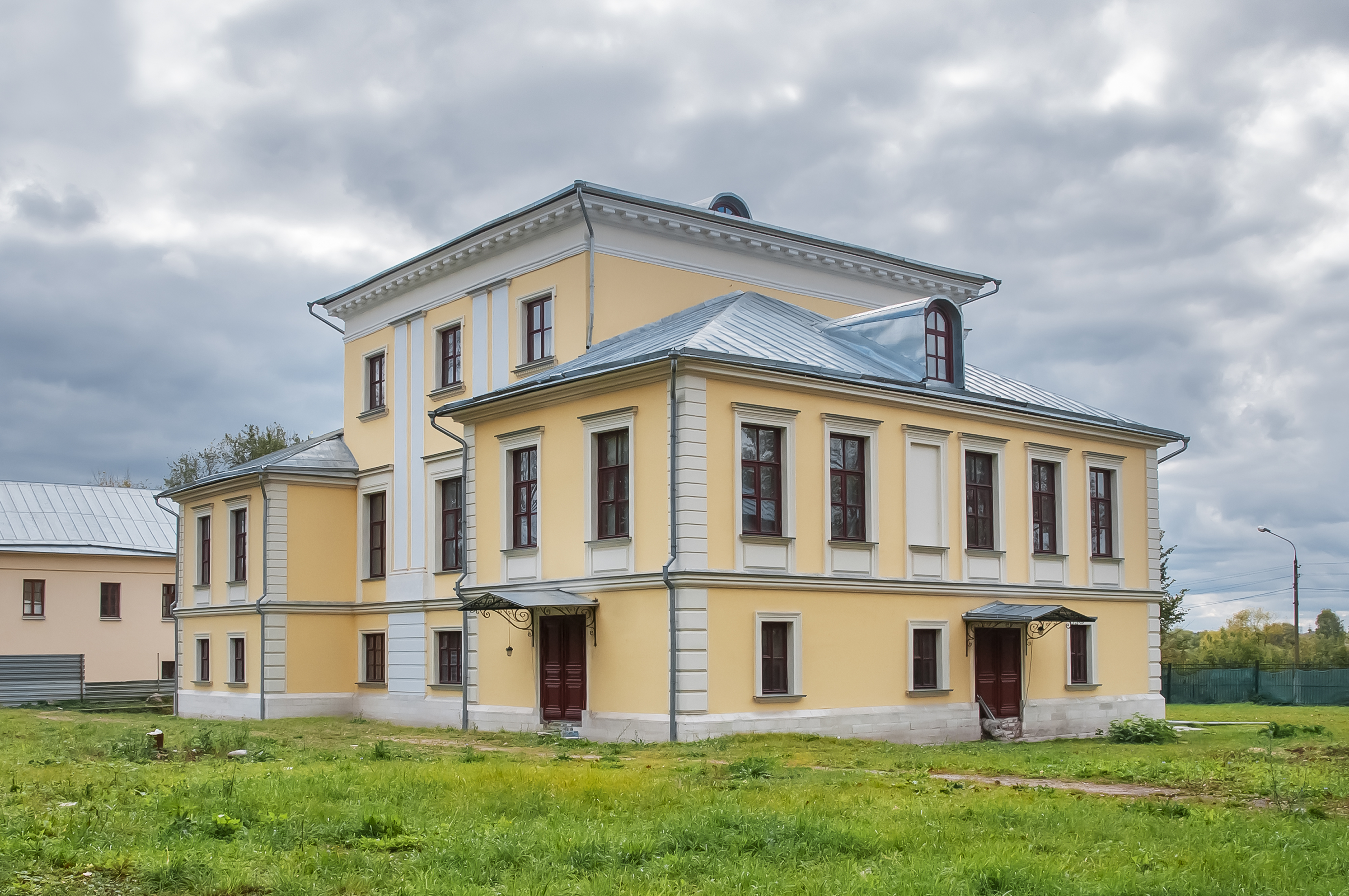 Главный дом: улица Лермонтова, 3, Воскресенск, Воскресенский район, Московская область